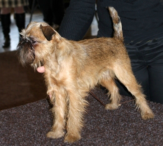 Aria Griffon-Land młoda suczka rasy gryfonik brukselski, umaszczenie rude z ciemną maską i nalotem